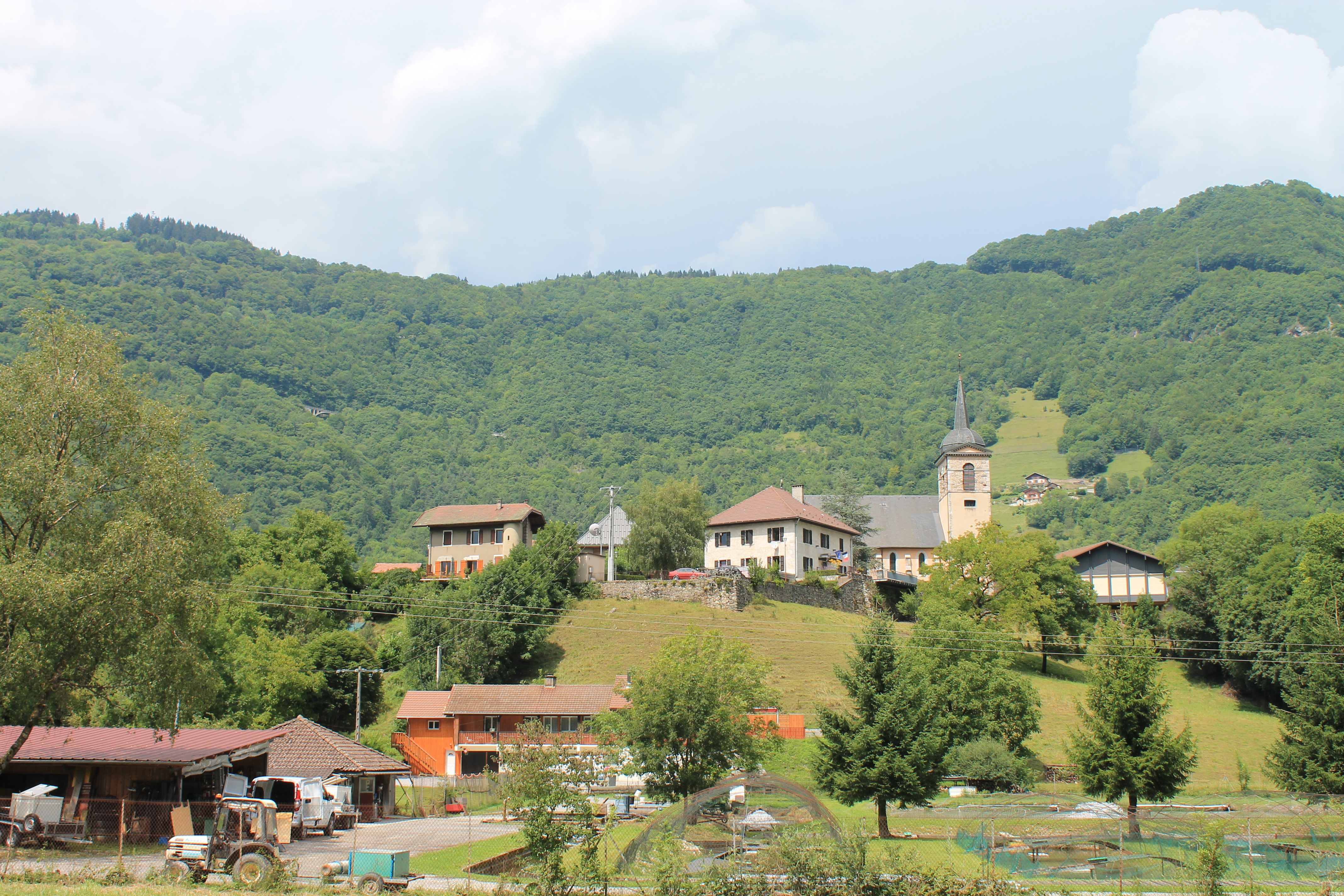 Village de Marlens depuis la RD 1508. Au premier plans, dans la plaine, la ferme Pisciculture